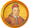 Medallón de la frise des papes de la basílica de San Pablo Extramuros, Roma. Es un retrato sobre mosaico que representa a Inocencio XIII, es el 244º papa de la Iglesia católica (1721-1724). Enlaza con la serie de medallones que reproducen la figura de todos los Papas de la historia.